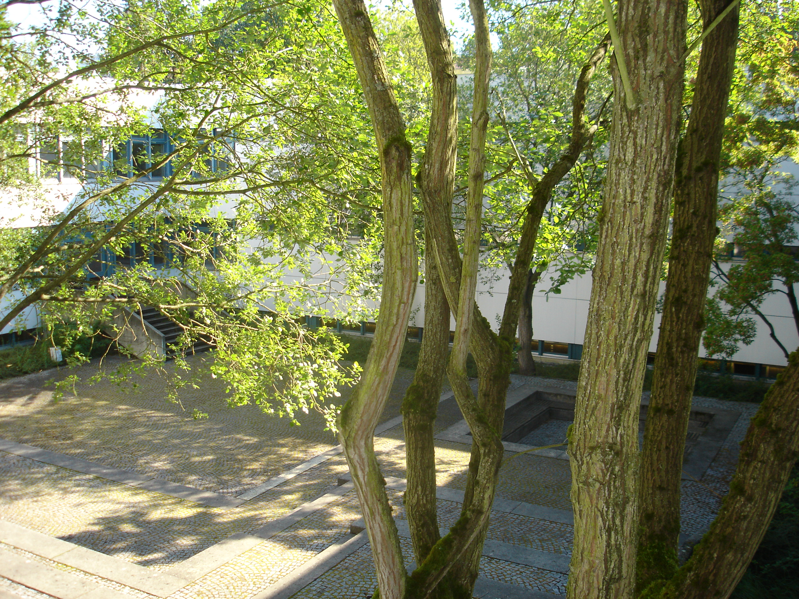 Innenhof des Camerloher-Gymnasiums Freising